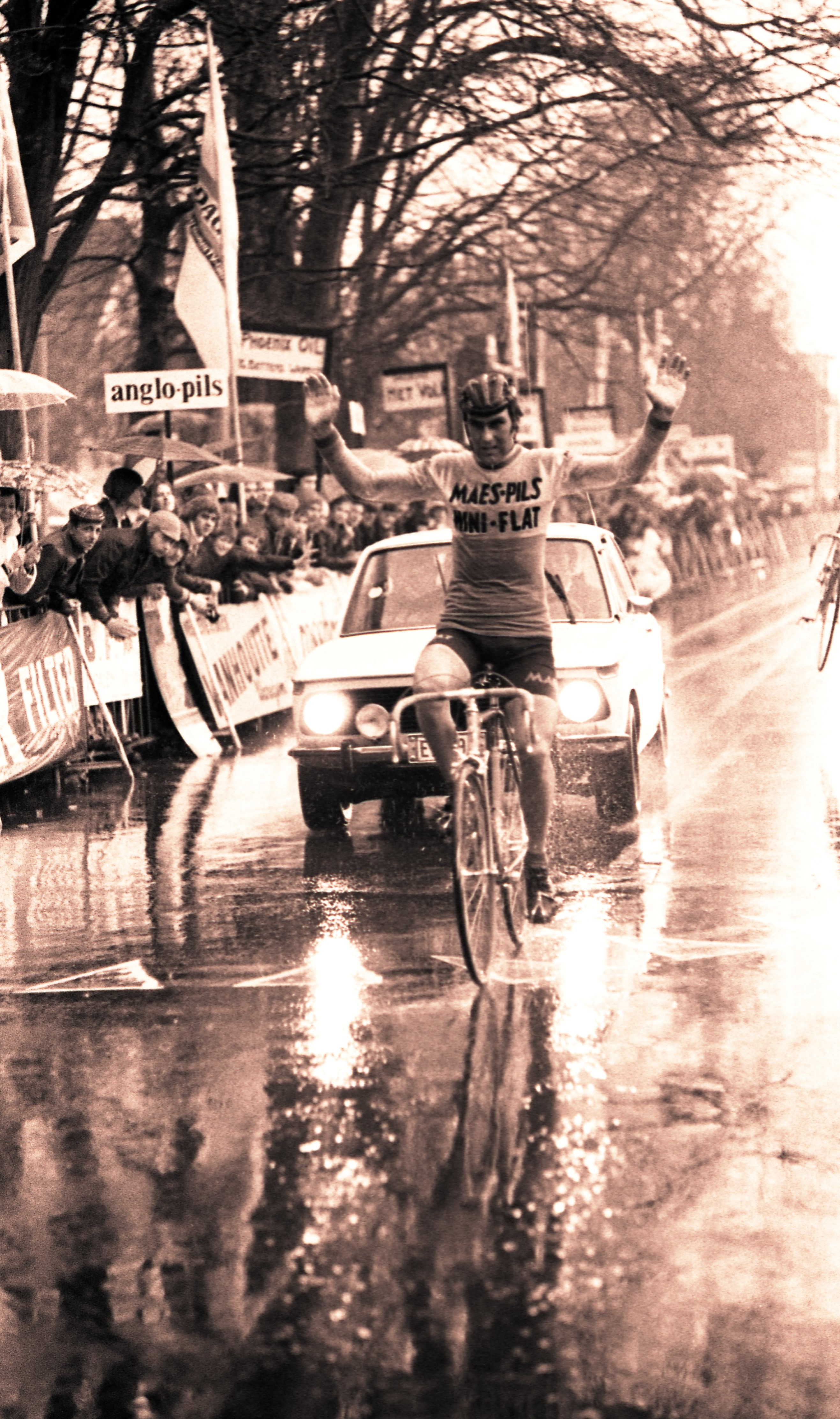 Op dertig kilometer voor de finish demarreert Planckaert. De Oost-Vlaming houdt stand en wint solo in Waregem.